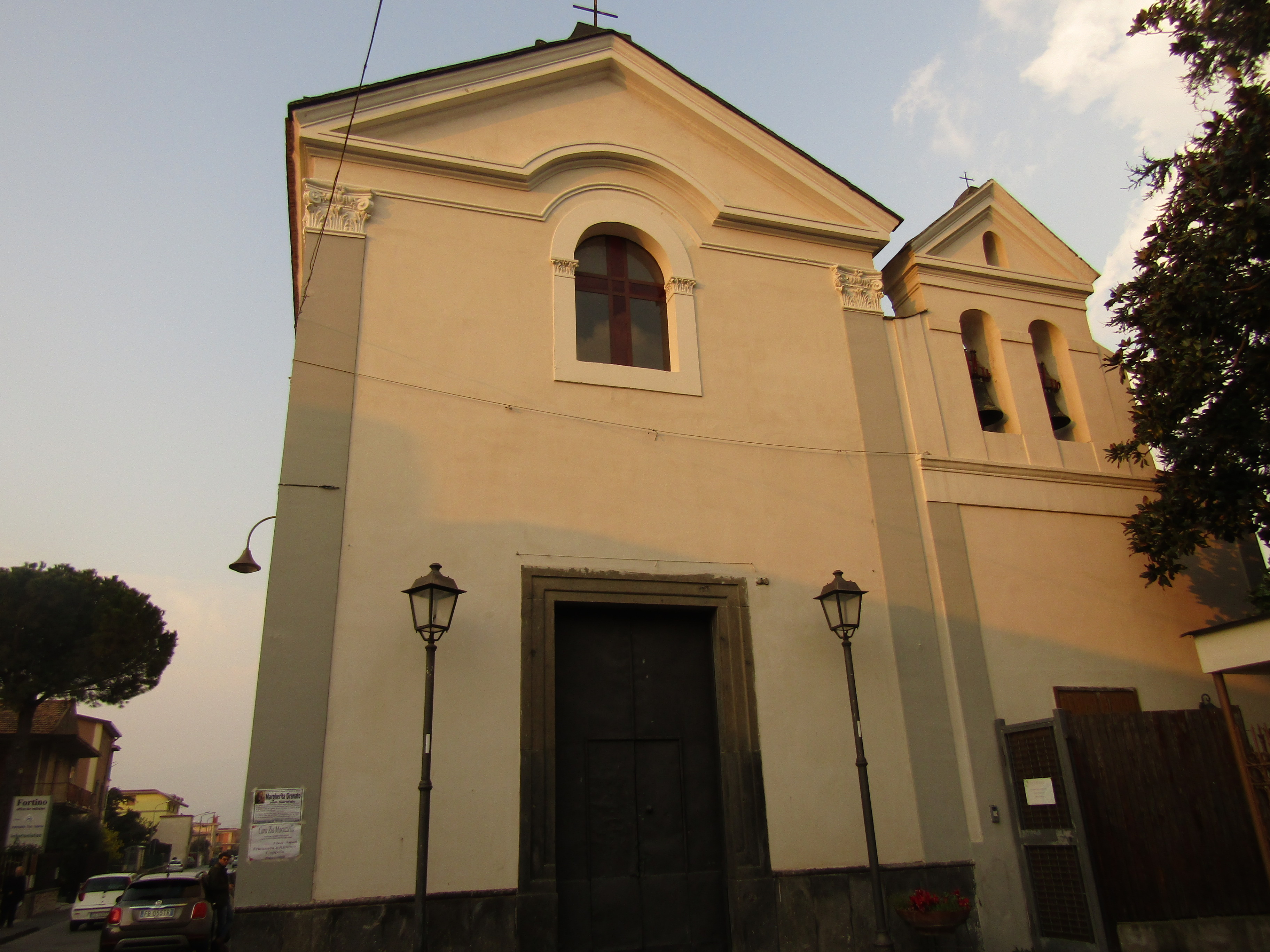 {Informazioni file |Descrizione = Chiesa Vecchia di San Giovanni Battista, Nocera inferiore. |Fonte = Mariano Rocco |Data = 22/02/2019 |Autore = Mariano Rocco |Licenza = vedi sotto |Detentore copyright = Mariano Rocco |EDP = |Altre versioni =